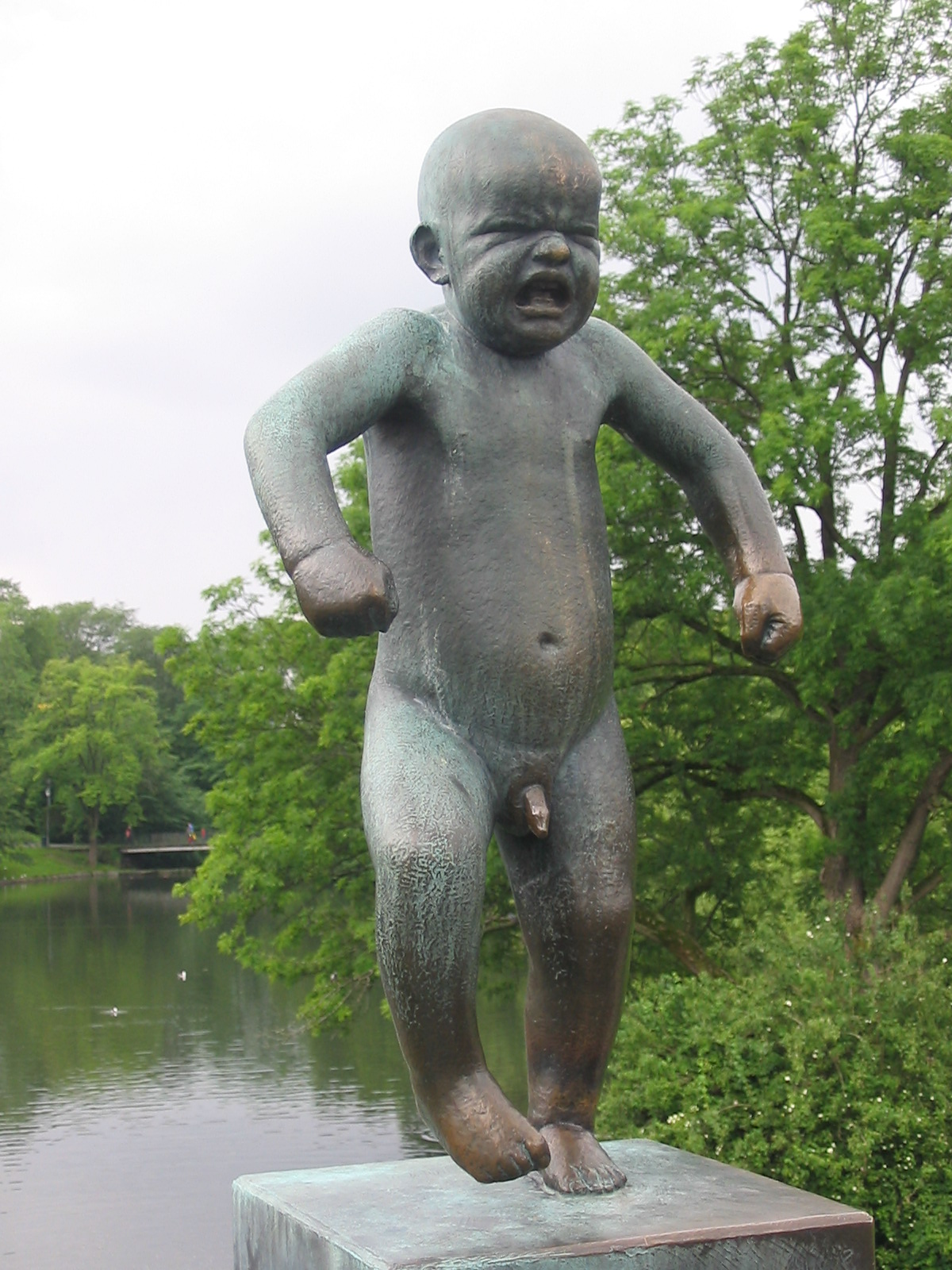 Statue du Parc Frogner - Oslo (Norvège). Je suisl'auteur du cliché pris en juillet 2004